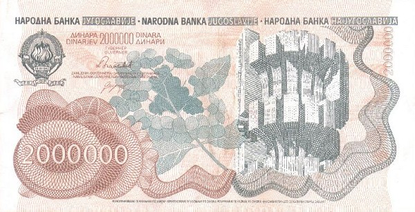 2 Million Yugoslav dinars note (1989)